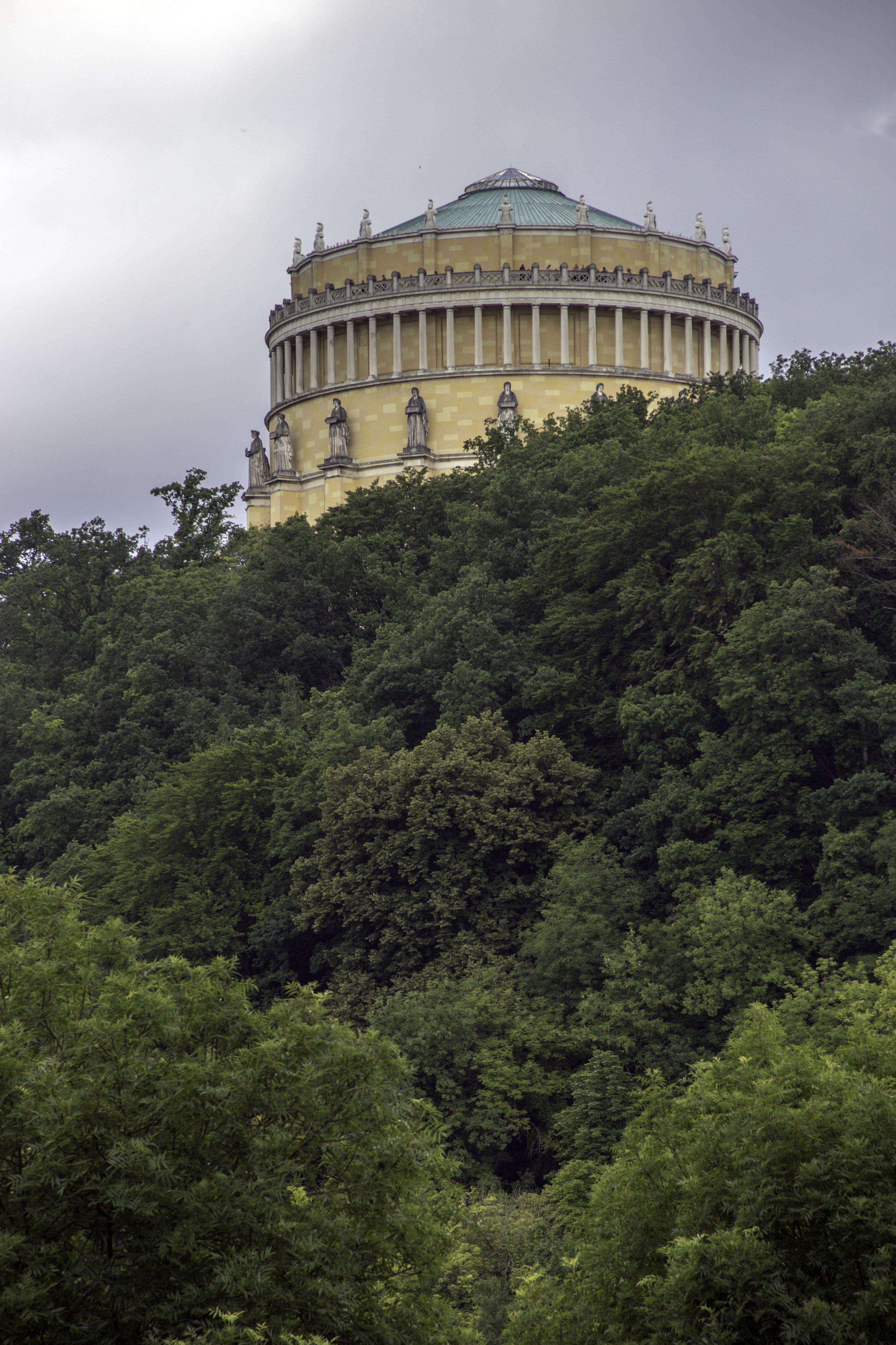 Befreiungshalle, Blick von Kehlheim